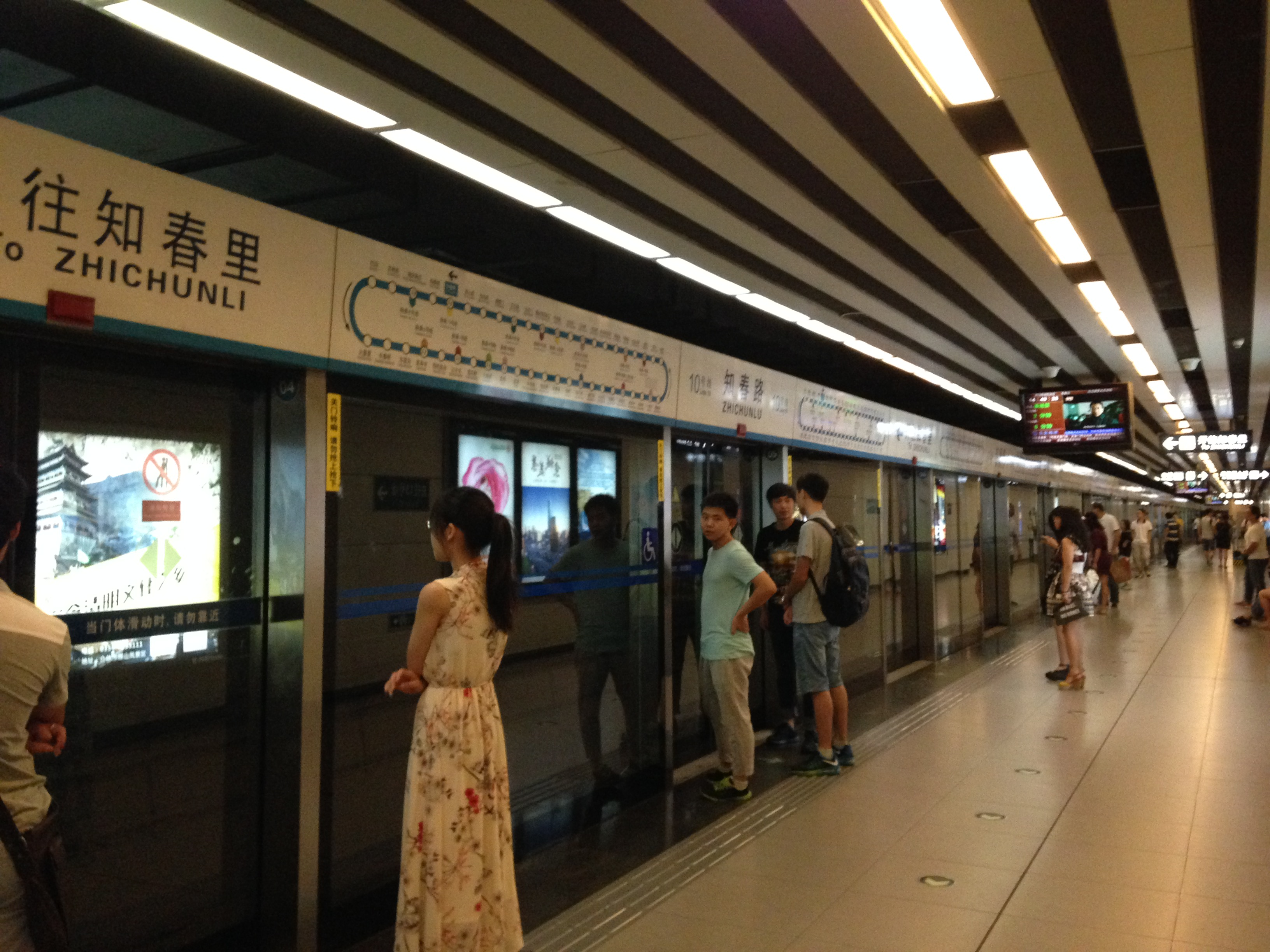 知春路駅のホーム(北京地下鉄10号線)